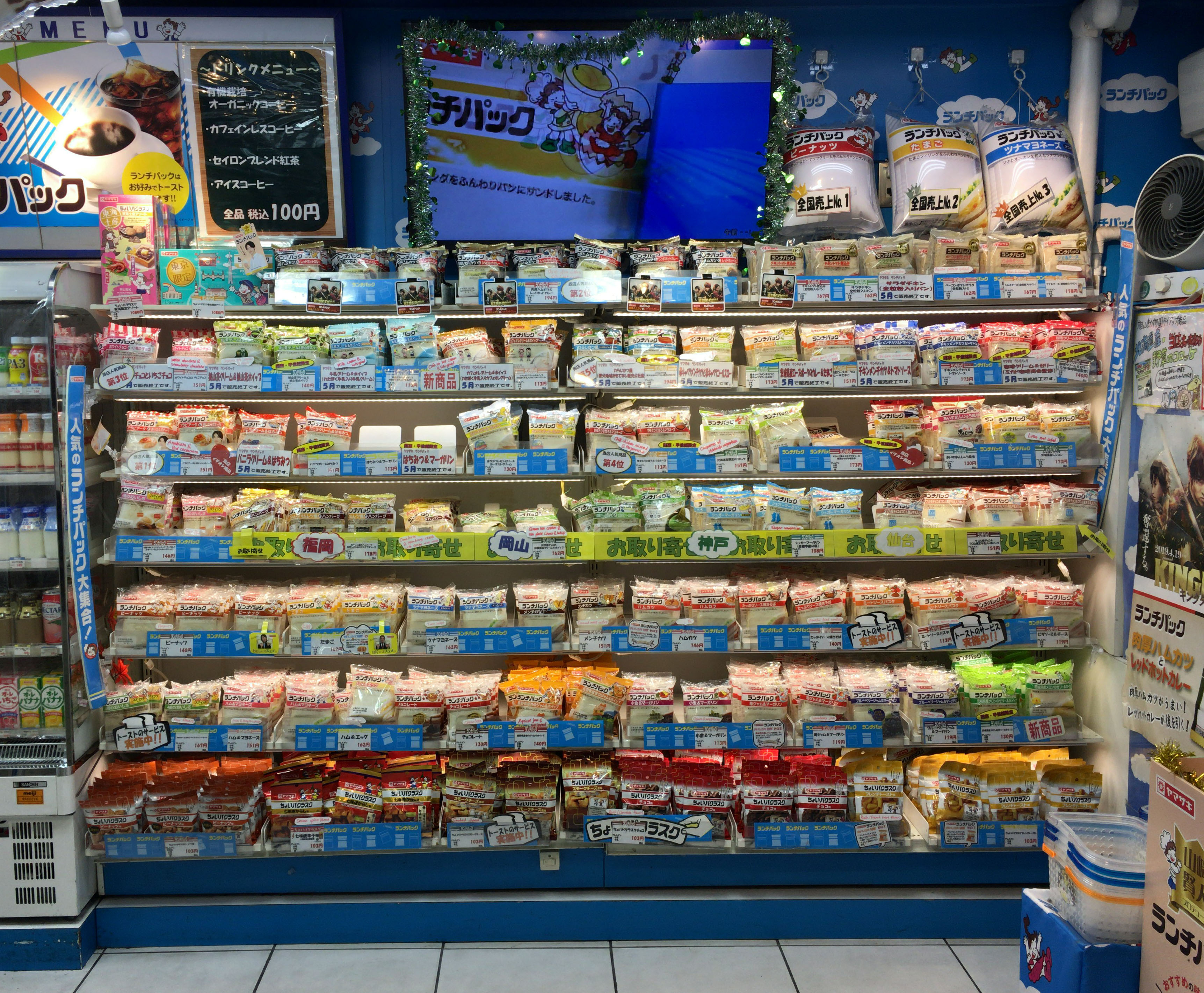 ランチパック SHOP 池袋店